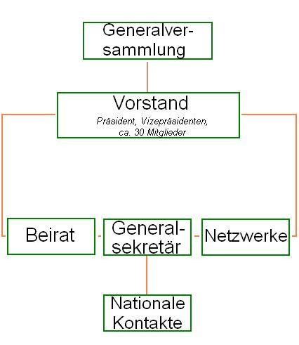 Die interne Organisation der AGEG